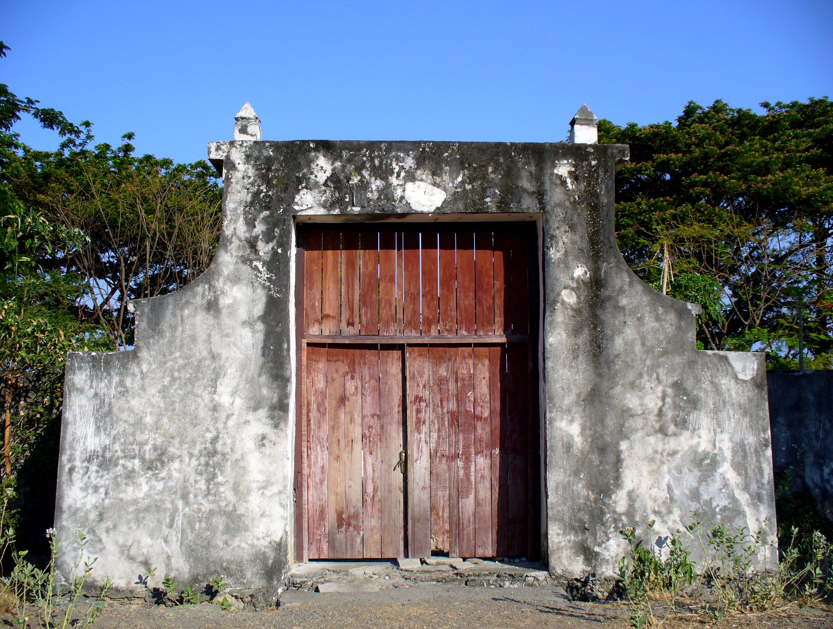 Portuguese Fort, Maubara, East Timor